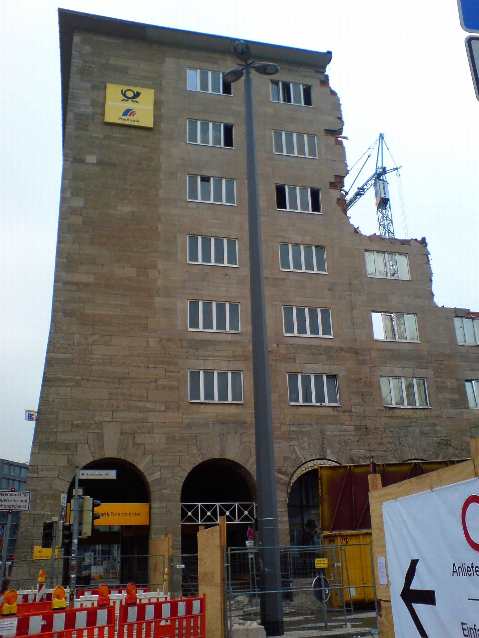 Kopfbau der Hauptpost, im Abriß 2018-02-08, Blick von Westen